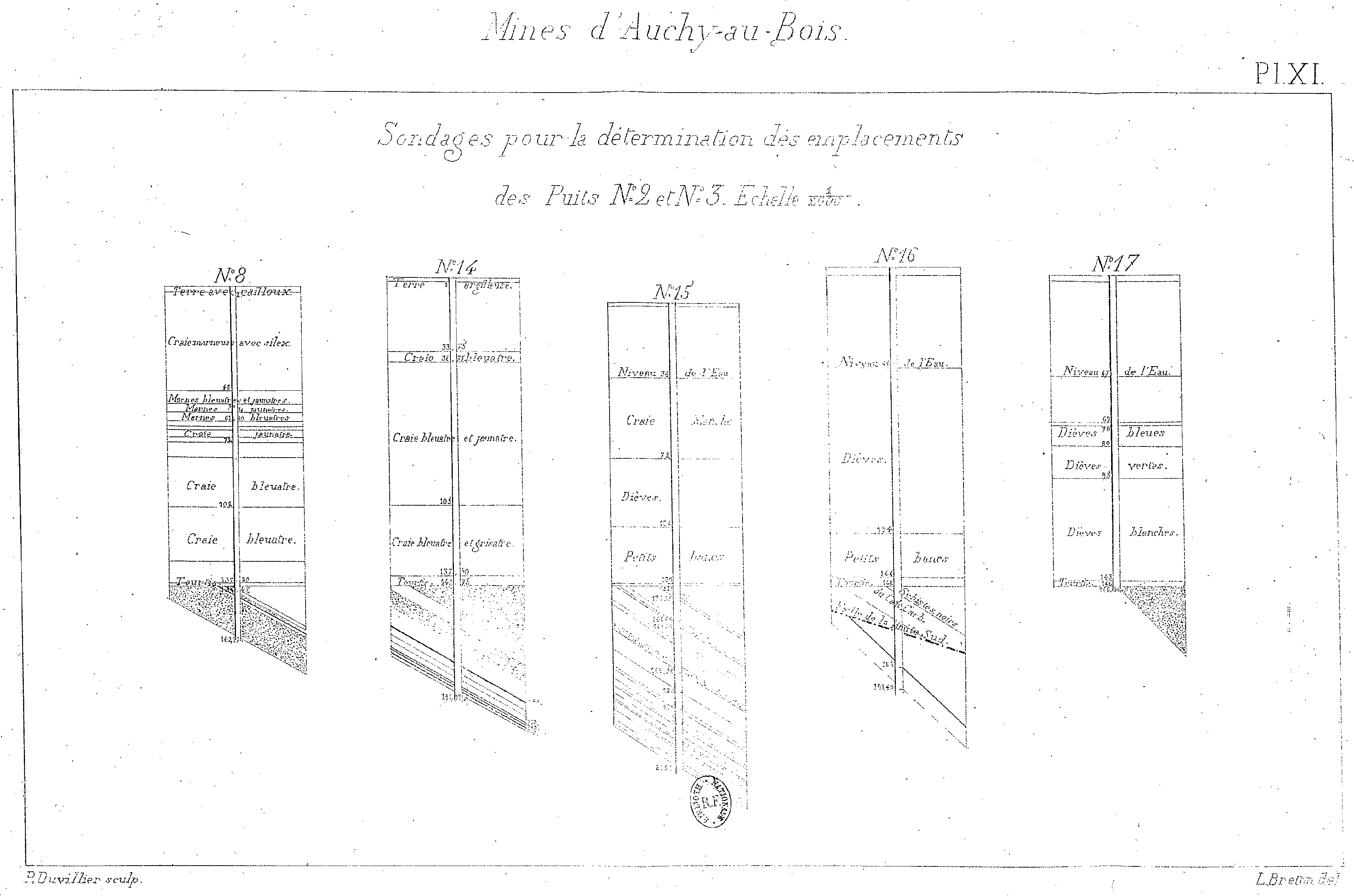 Compagnie des mines d'Auchy-au-Bois.